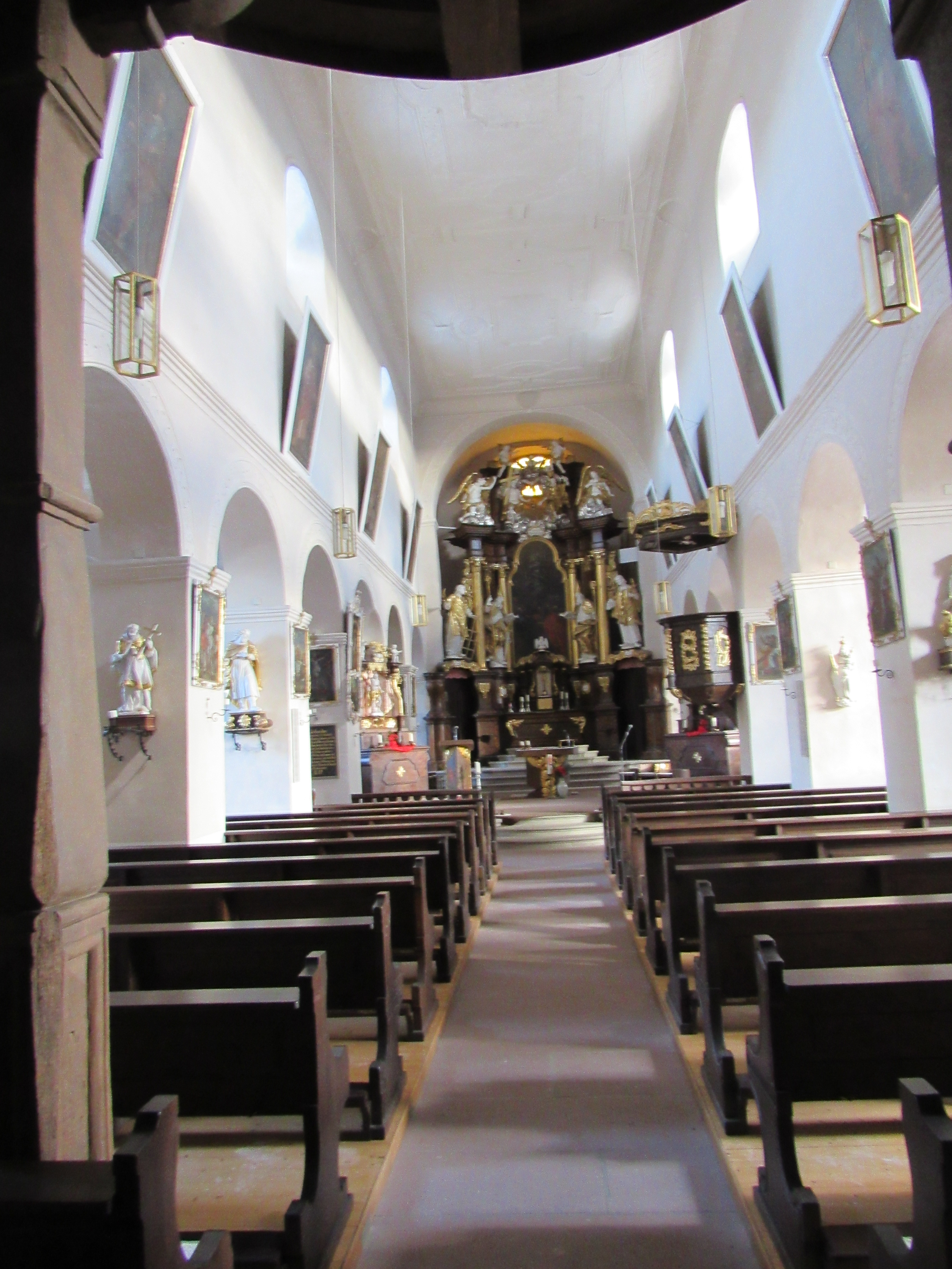 Innenraum der alten Klosterkirche